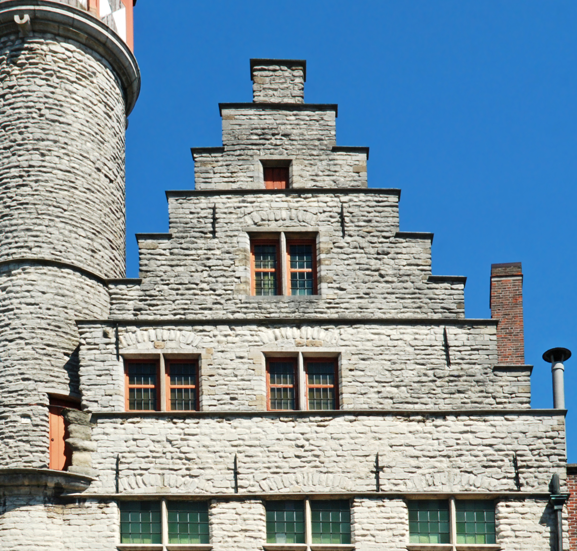 Belgique - Gand - Maison de la Corporation des Tanneurs - Het Toreken (gothique 1451-1483)